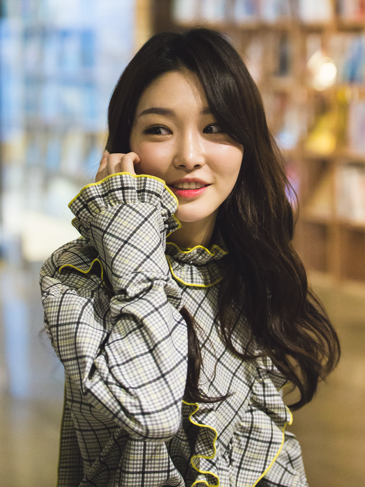 170407 김청하 다이아 청음회 6 pic